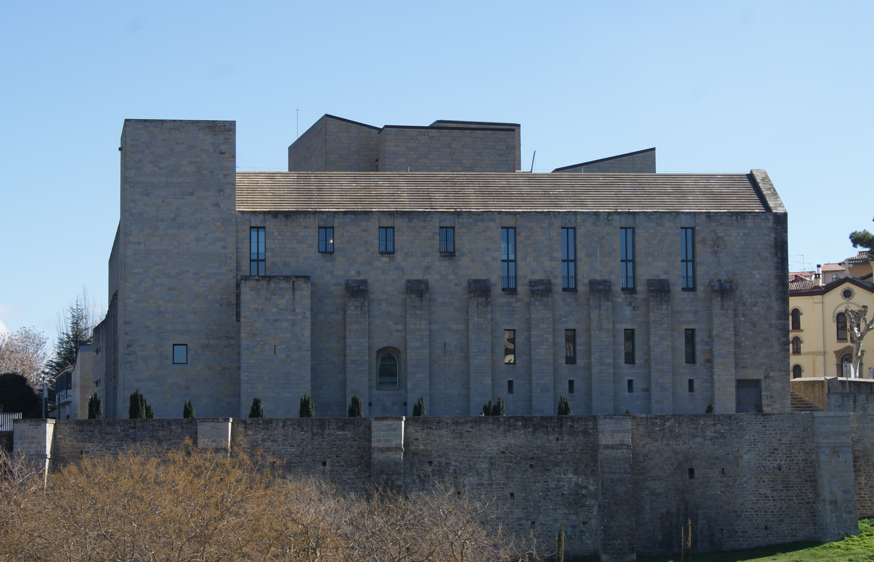 Vista del Archivo Real y General de Navarra (antiguo Palacio de los Reyes de Navarra) restaurado por Rafael Moneo a principios del siglo XXI